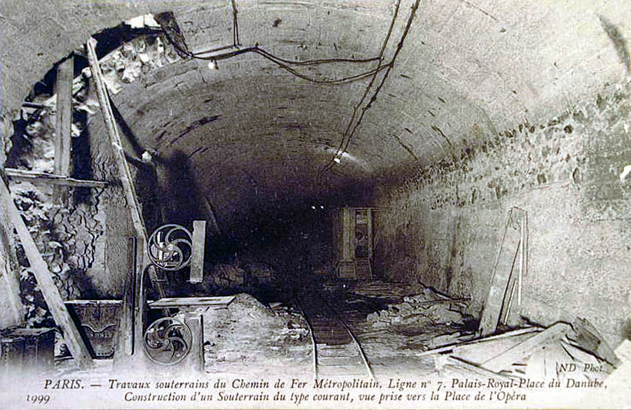 Travaux souterrains du Métropolitain - Ligne 7 - Vue prise vers la place de l'Opéra, Paris, France.